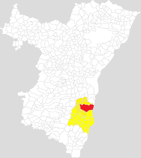 Cartographie